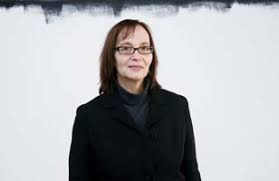 Catherine Beaugrand à la Biennale de Saint Étienne de 2008